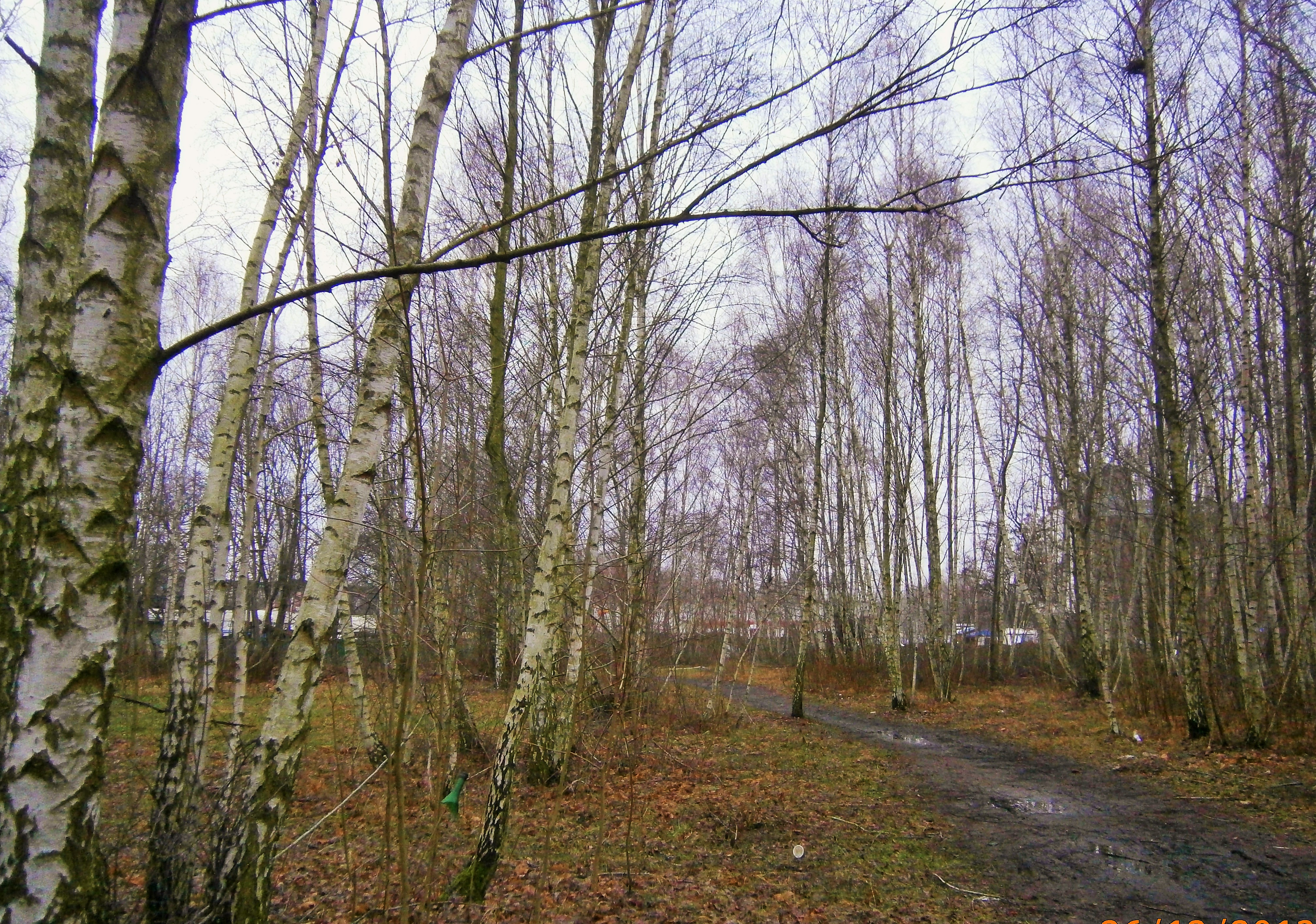 Die Kopenhagener Straße ist eine Straße in Berlin-Wilhelmsruh, die sich nach Süden in Reinickendorf fortsetzt. Hier der Lübarser Weg im Birkenwäldchen auf dem vormaligen Mauerstreifen, neben dem Berliner Mauerweg. Östlich der Kopenhagener Straße.